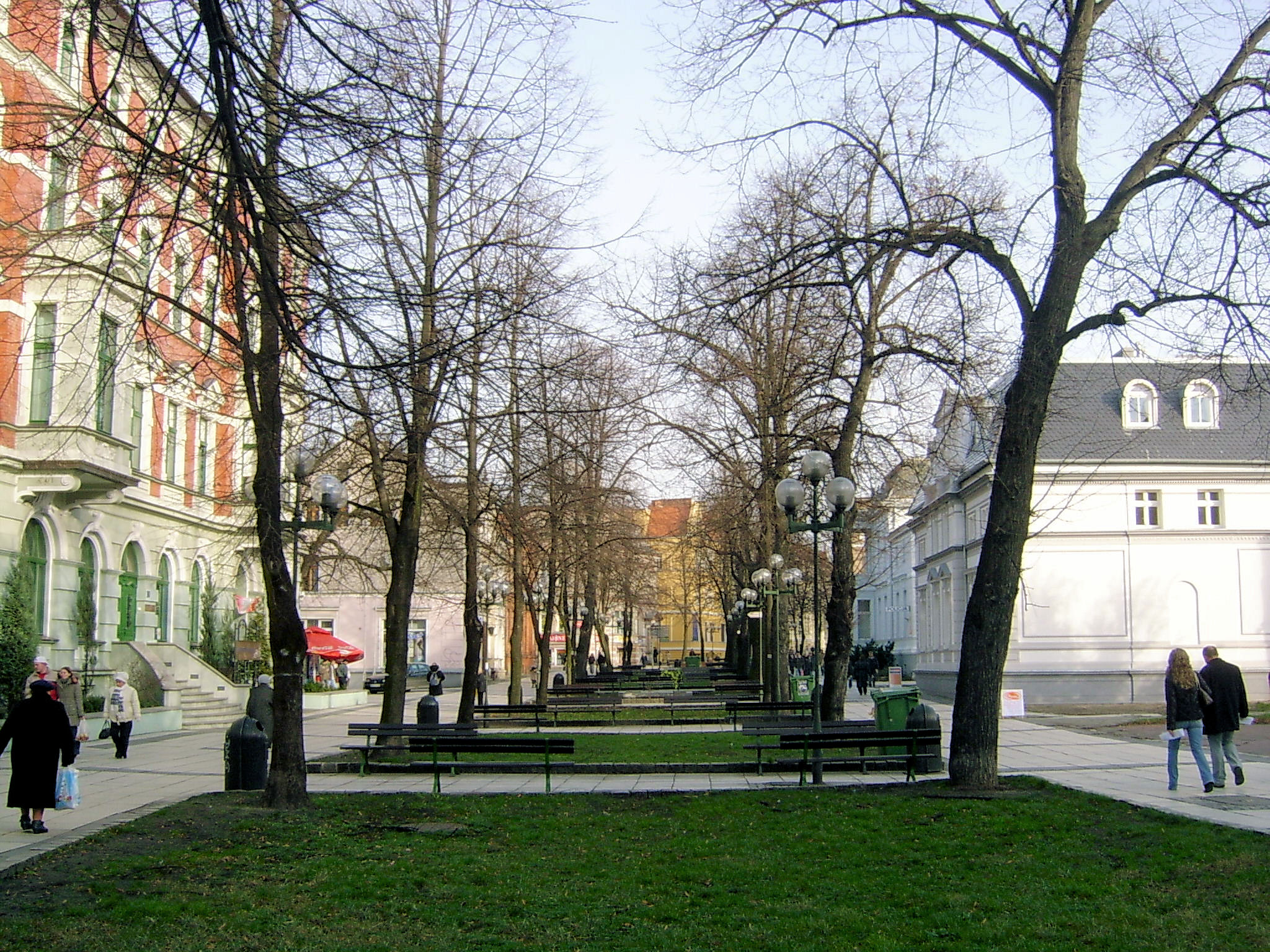 Zielona Góra, Aleja Niepodległości